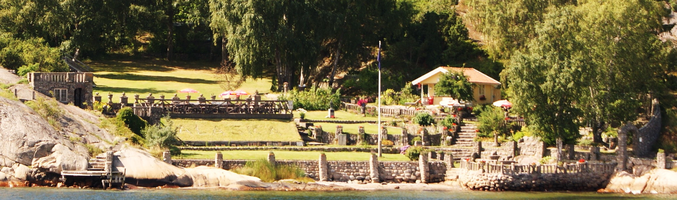 Alaska på ön Nord-Långö i Strömstads kommun.